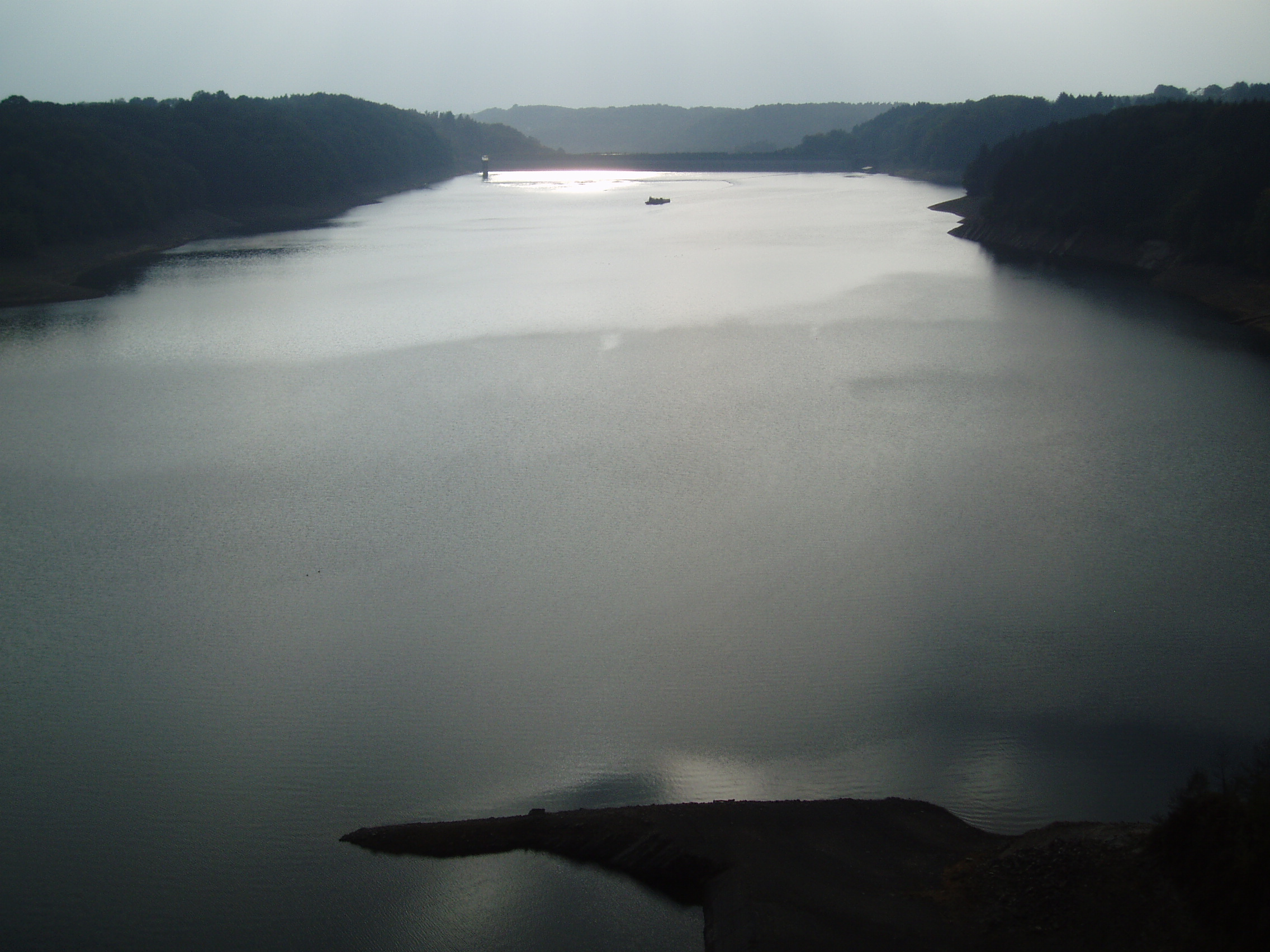 Blick auf die Wahnbachtalsperre von Pinn aus, aufgenommen am 18.11.2006